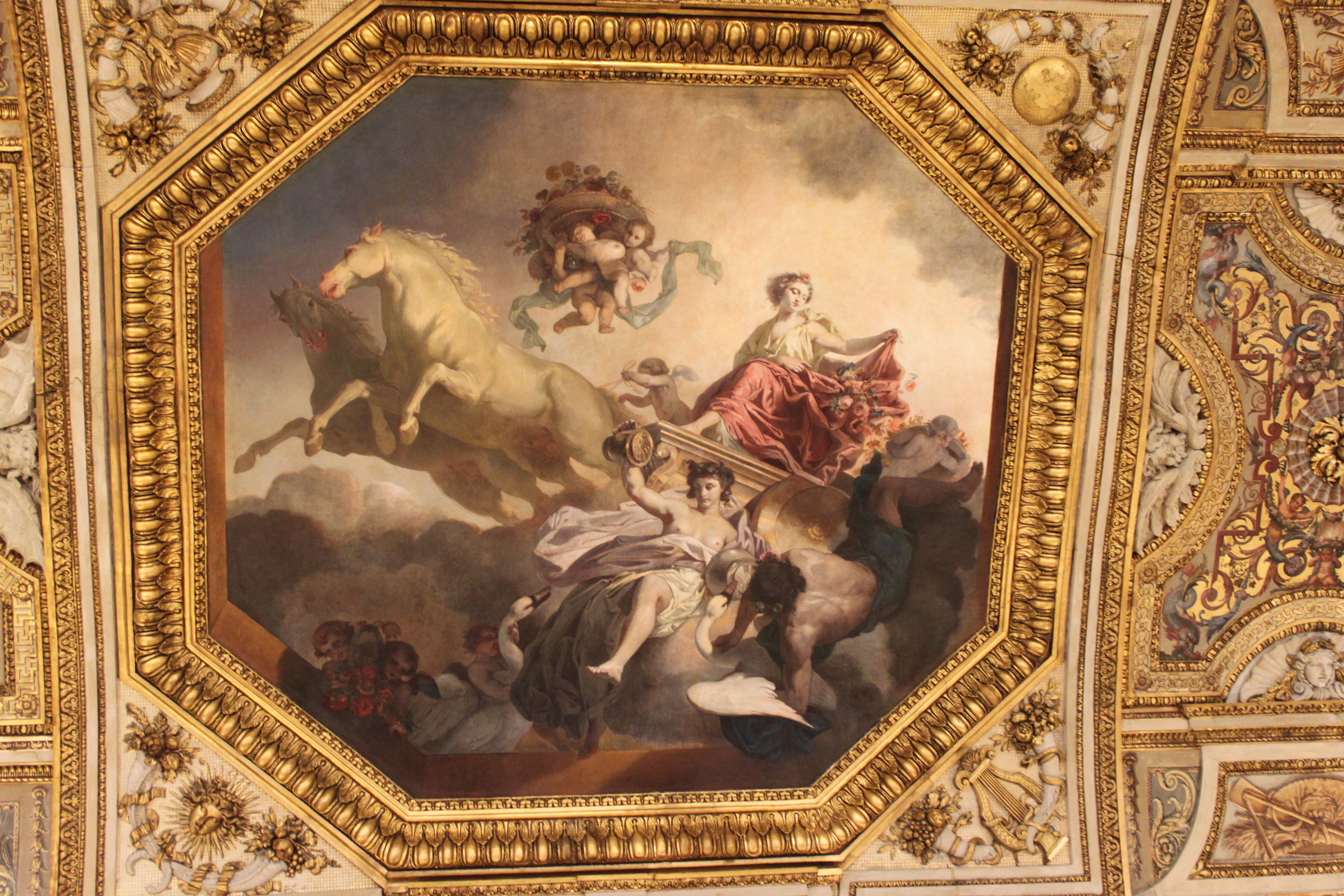 Le titre du tableau est L’Aurore (1850) de Charles-Louis Muller (1815-1892). Il s'agit de l'’octogone méridional de la galerie "Apollon au musée du Louvre. Il avait d'abord été peint par Le Brun avant sa destruction en 1775 à la suite d'un accident. Duban confia l’entreprise de la repeindre à Charles-Louis Muller en 1850. La toile subit dès 1868 de forts dommages et fut reprise par Muller lui-même, qui la restaura complètement.